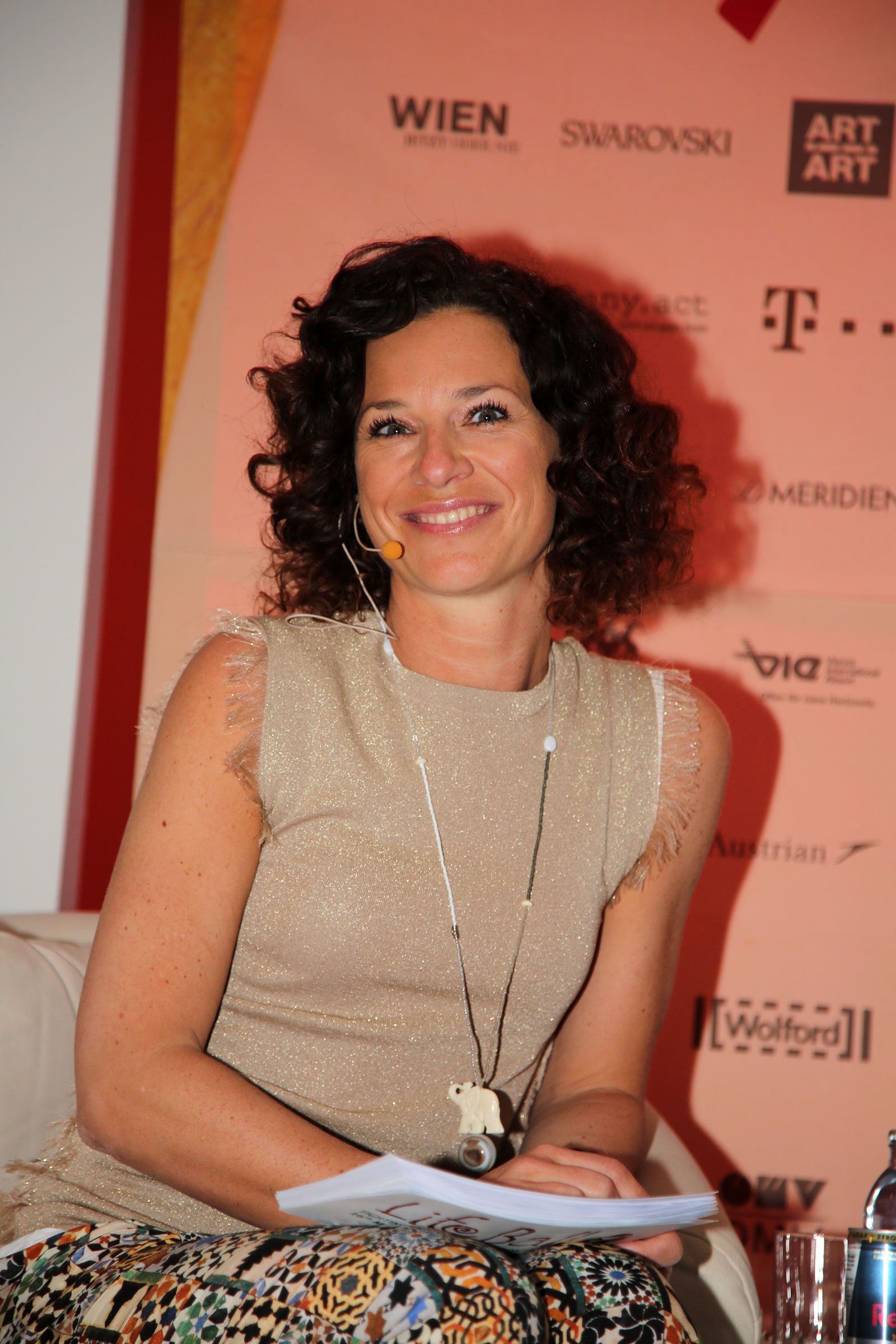 König_Sandra-3568